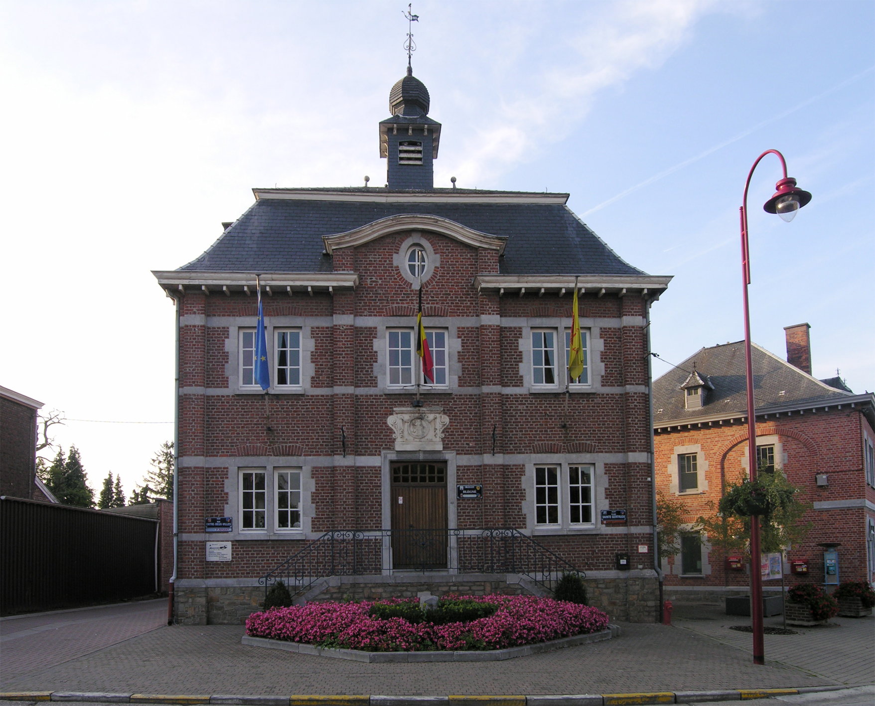 Maison communale de Blegny - Casa de la vila de Blegny